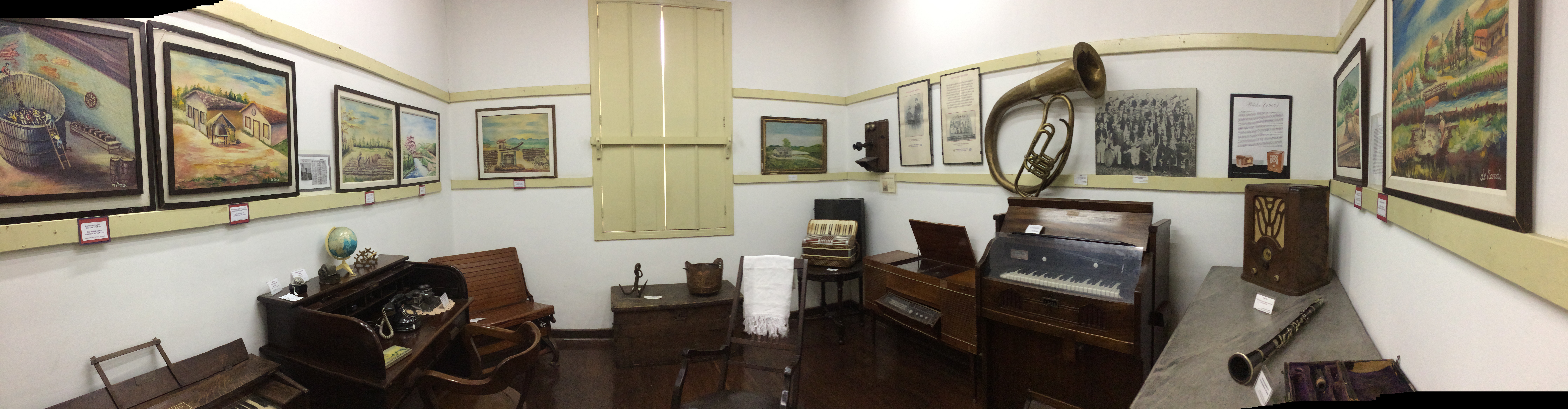 Objetos da época doados para o museu